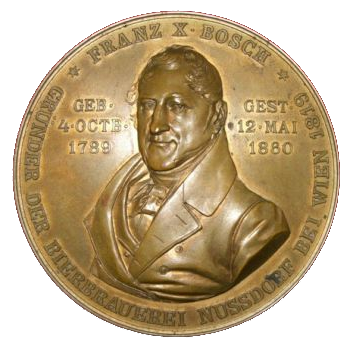 Franz X. Bosch, Gründer der Bierbrauerei Nußdorf b. Wien, Gewidmet zum 75. Jubiläum 1894 Von K. AD. BACHOFEN v. ECHT u. JOH. MEDINGER